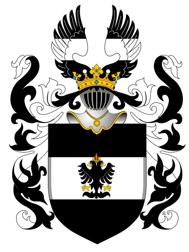 Česky: Rodový znak Colloredo